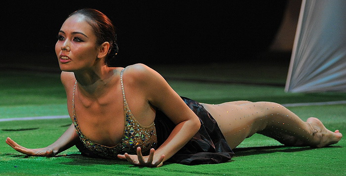 Ляйсан Утяшева